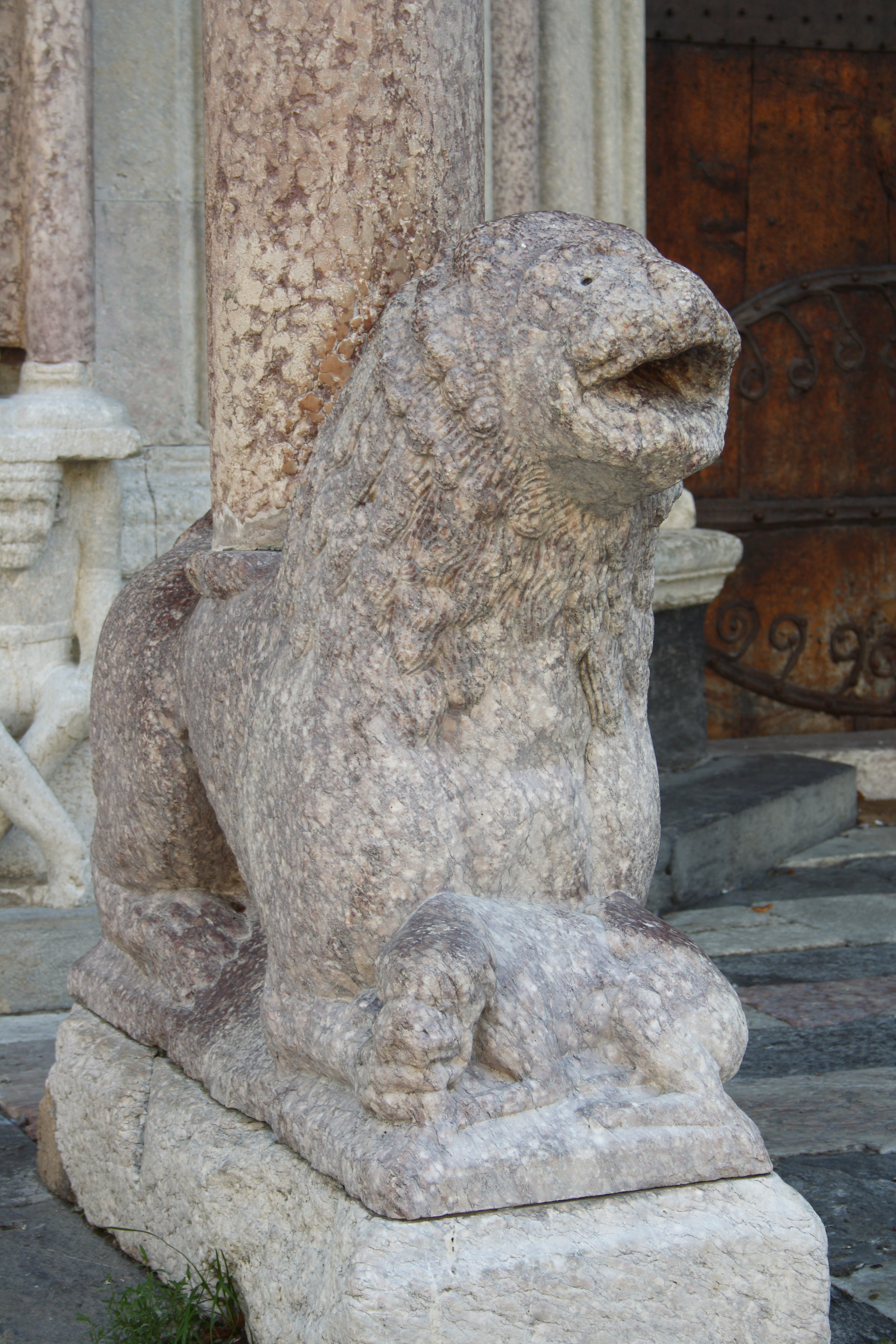 Ehemalige Kathedrale Notre-Dame in Embrun, einer Gemeinde im Département Hautes-Alpes in der französischen Region Provence-Alpes-Côte d'Azur, Skulptur am Nordportal Le Réal, Darstellung: Löwe, der eine Säule trägt und ein Tier in den Klauen hält